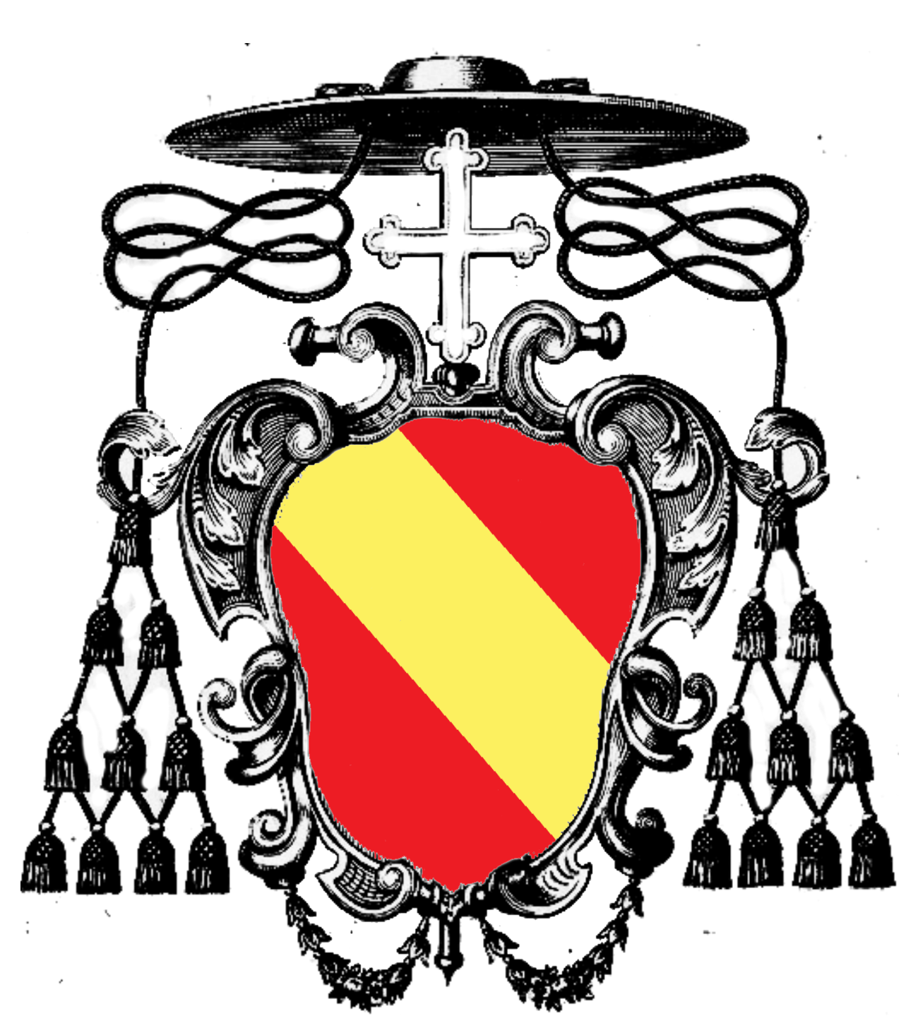 Cardinalis de Alcase